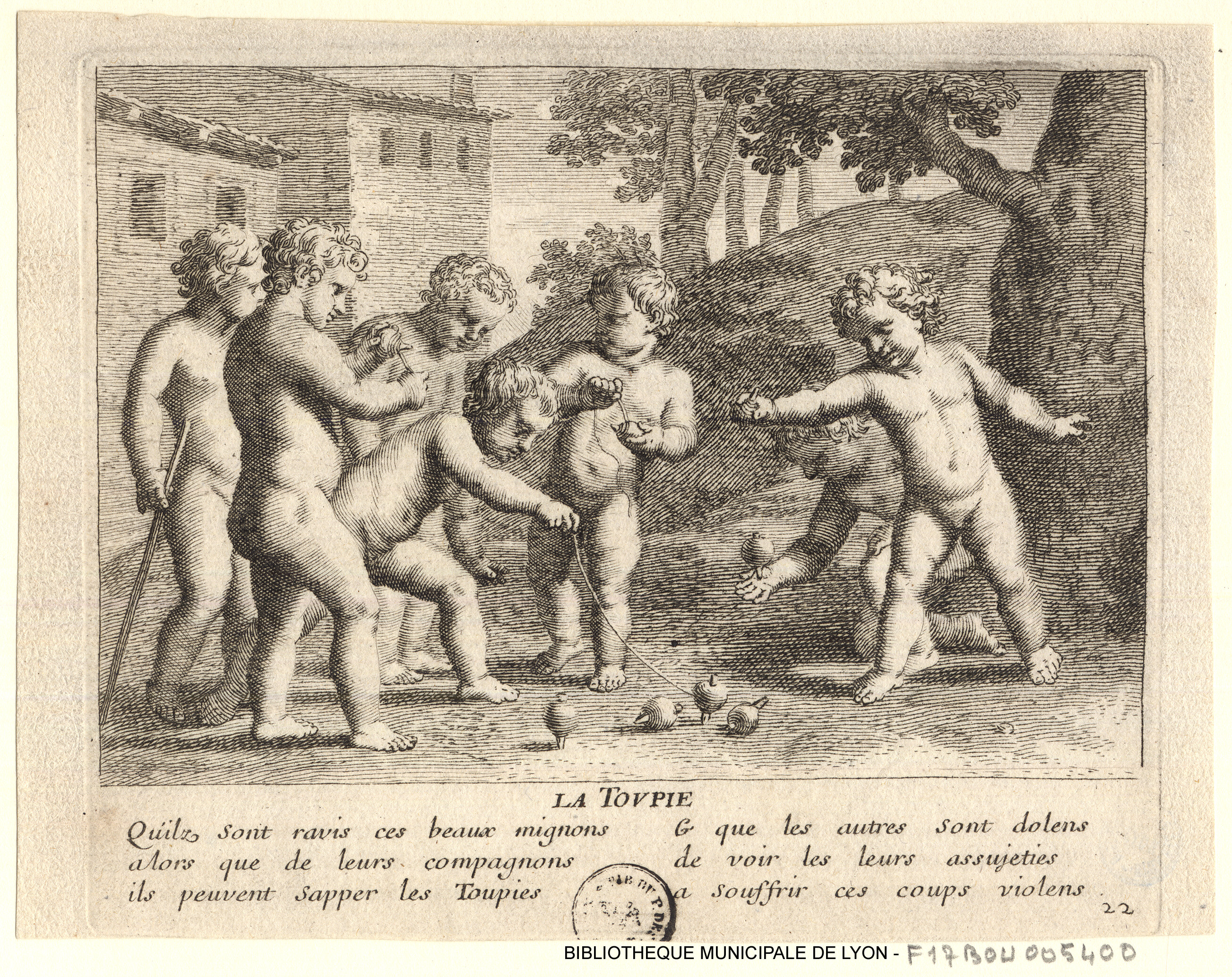 Jeux d'enfants